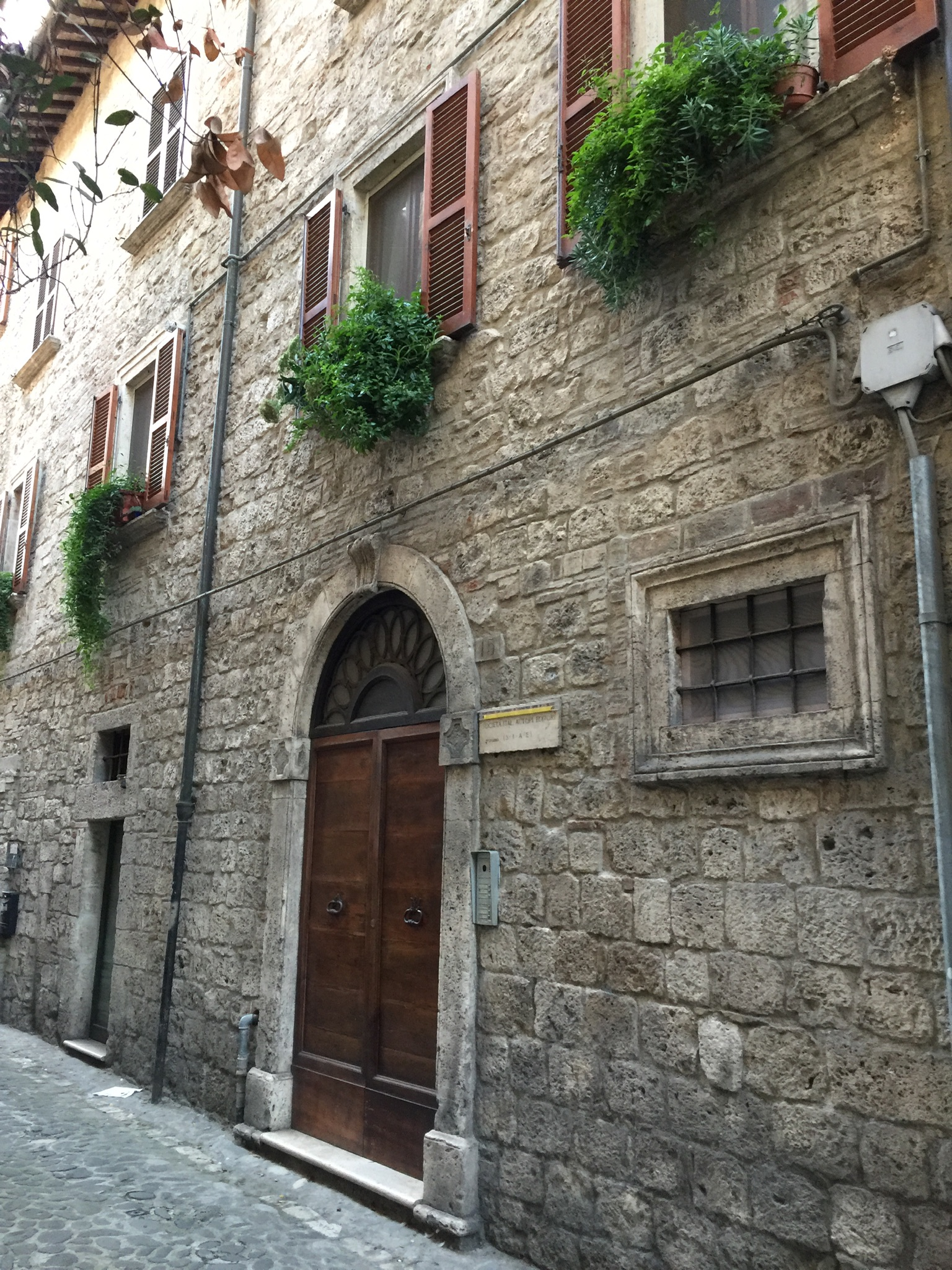 Sede SIAE Ascoli Piceno